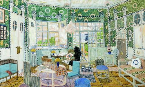 Эскиз декорации к драме Г. Ибсена "Маленький Эйольф". 1907 Эскиз Астраханская государственная картинная галерея имени П.М.Догадина